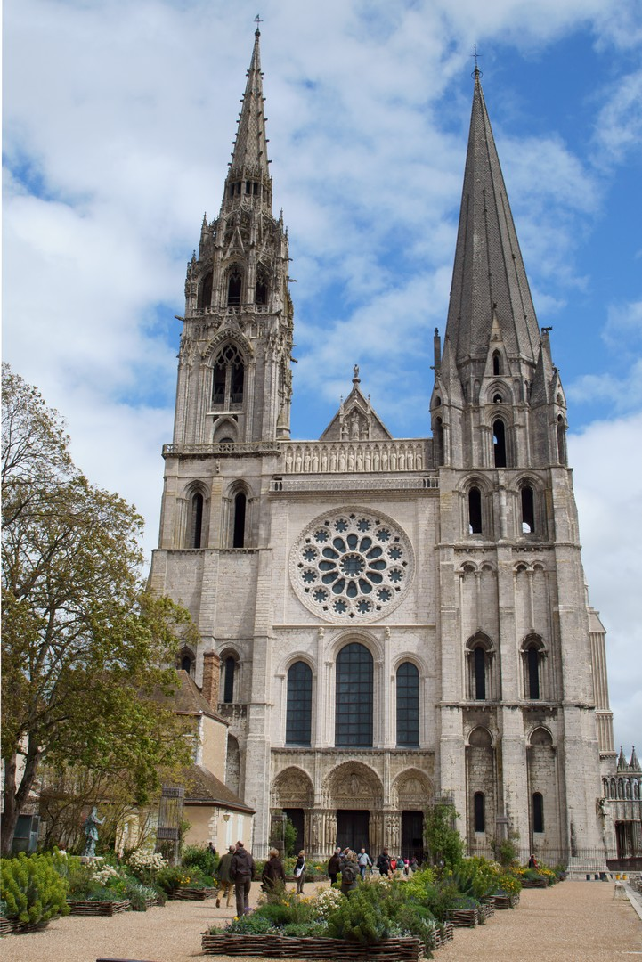 Cathédrale Notre-Dame (Classé) .